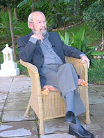 Photo du poète espagnol José Manuel Caballero Bonald.